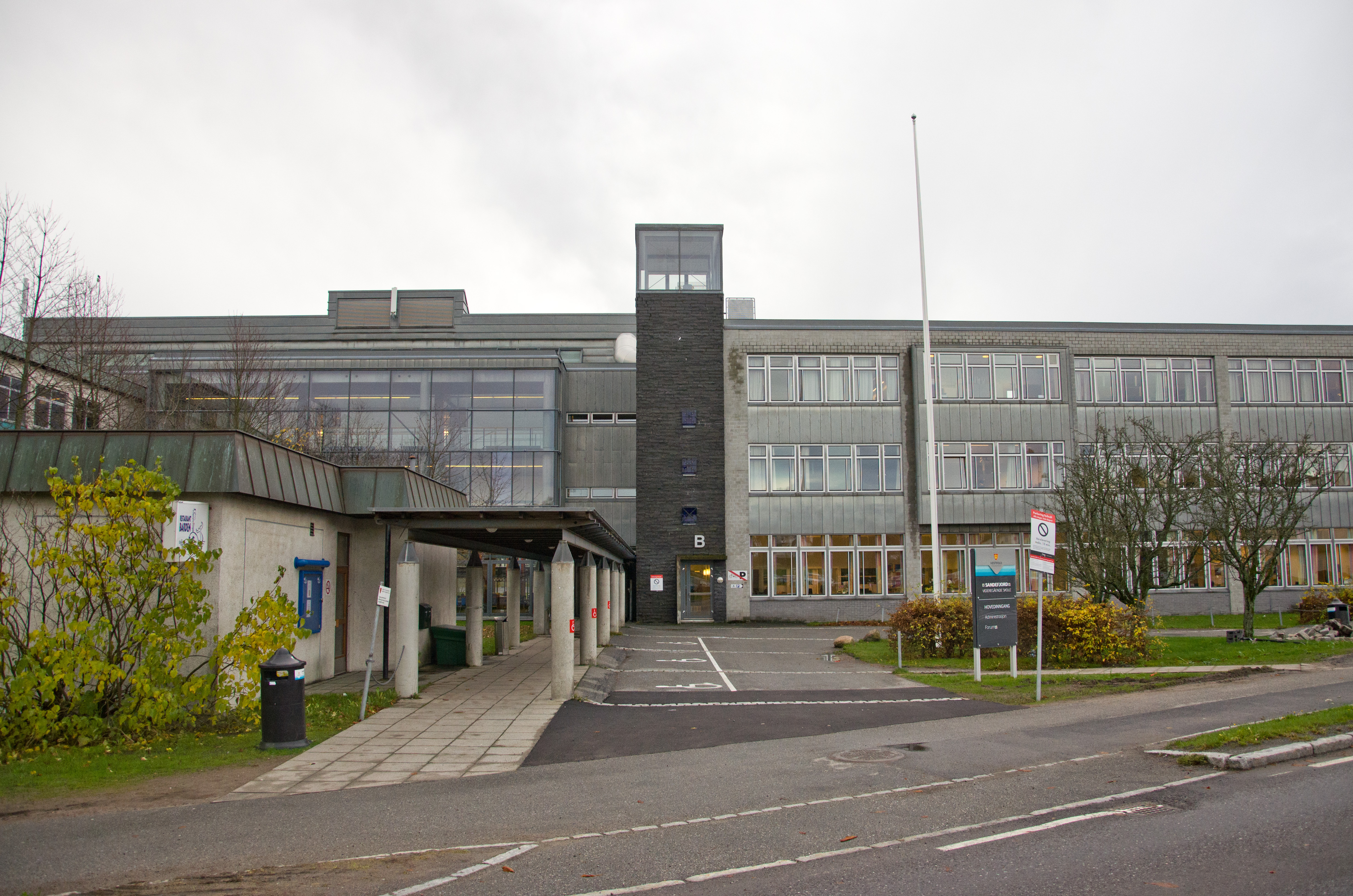 Sandefjord videregående skole